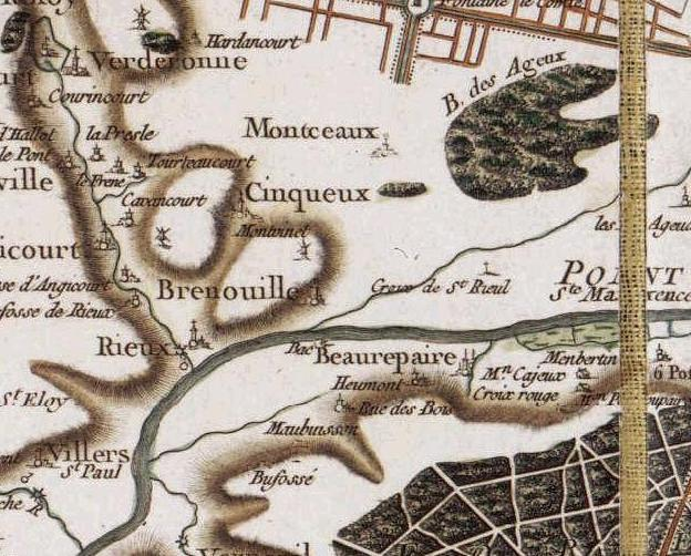 Brenouille (60) par la carte de Cassini